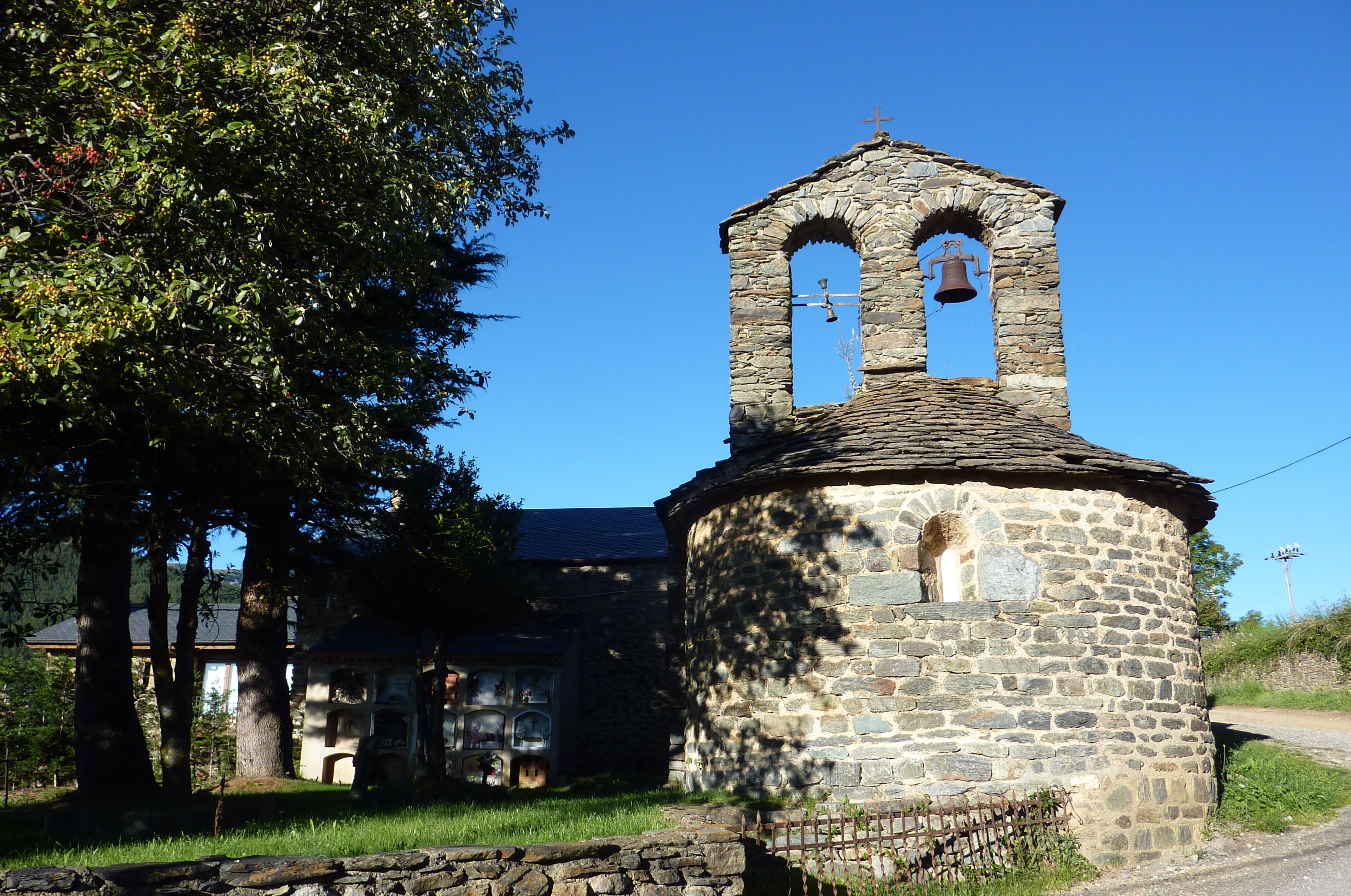 Església de Sant Marcel de Planés (Planoles)